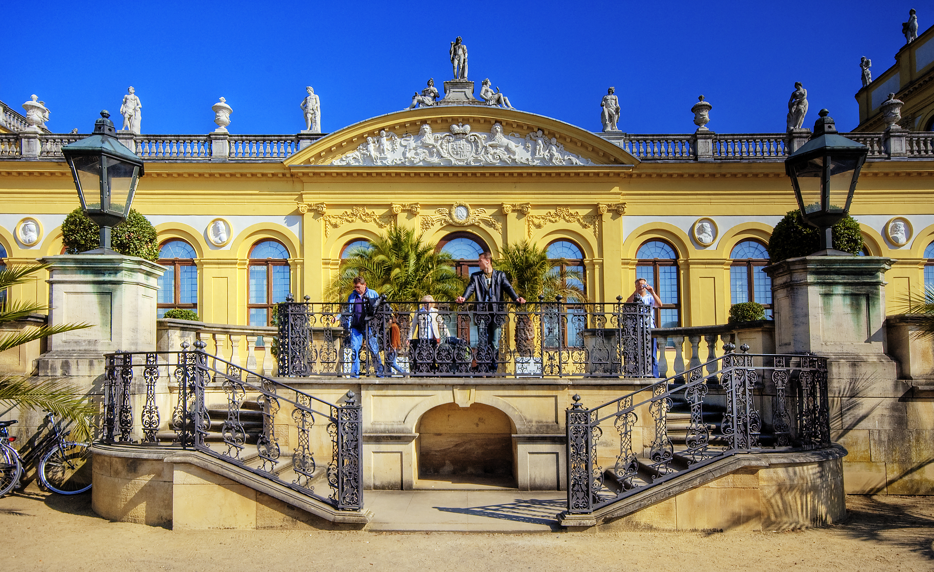 Die Orangerie in Kassel wurde unterhalb bzw. rund 400 m südlich des ehemaligen Stadtschlosses nahe dem westlichen Fuldaufer unter Landgraf Karl zwischen 1703 und 1711 erbaut. Seitdem bildet es den nördlichen Anfang der Karlsaue. Heutige Nutzung Heute ist die Orangerie Sitz des Astronomisch-Physikalischen Kabinetts mit darin integriertem Planetarium. Dem Museum ist seit 1996 der „Planetenwanderweg Karlsaue“ angegliedert. Die Verwaltung der Museumslandschaft Hessen-Kassel strebt die Wiederaufnahme der Orangeriekultur in Kassel an. Zu diesem Zweck sollen in Zukunft wiederum Zitruspflanzen zumindest in Teilen der Orangerie überwintert und die Räumlichkeiten im Sommer für Veranstaltungen genutzt werden. Während der documenta 12 wird die Wiese vor der Orangerie für die Ausstellung genutzt, hierzu wurde eine 9500 m² große Halle auf der Wiese errichtet und dazu die Wiese zu großen Teilen asphaltiert. Diese Halle wird Auepavillon genannt.